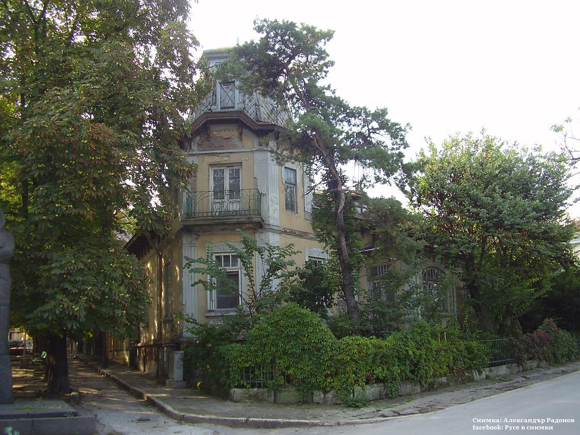 Къщата на полковник Иван Петров в гр. Русе